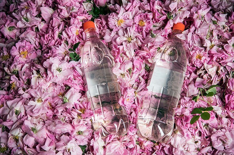 گلاب گیری در میمند - فارس